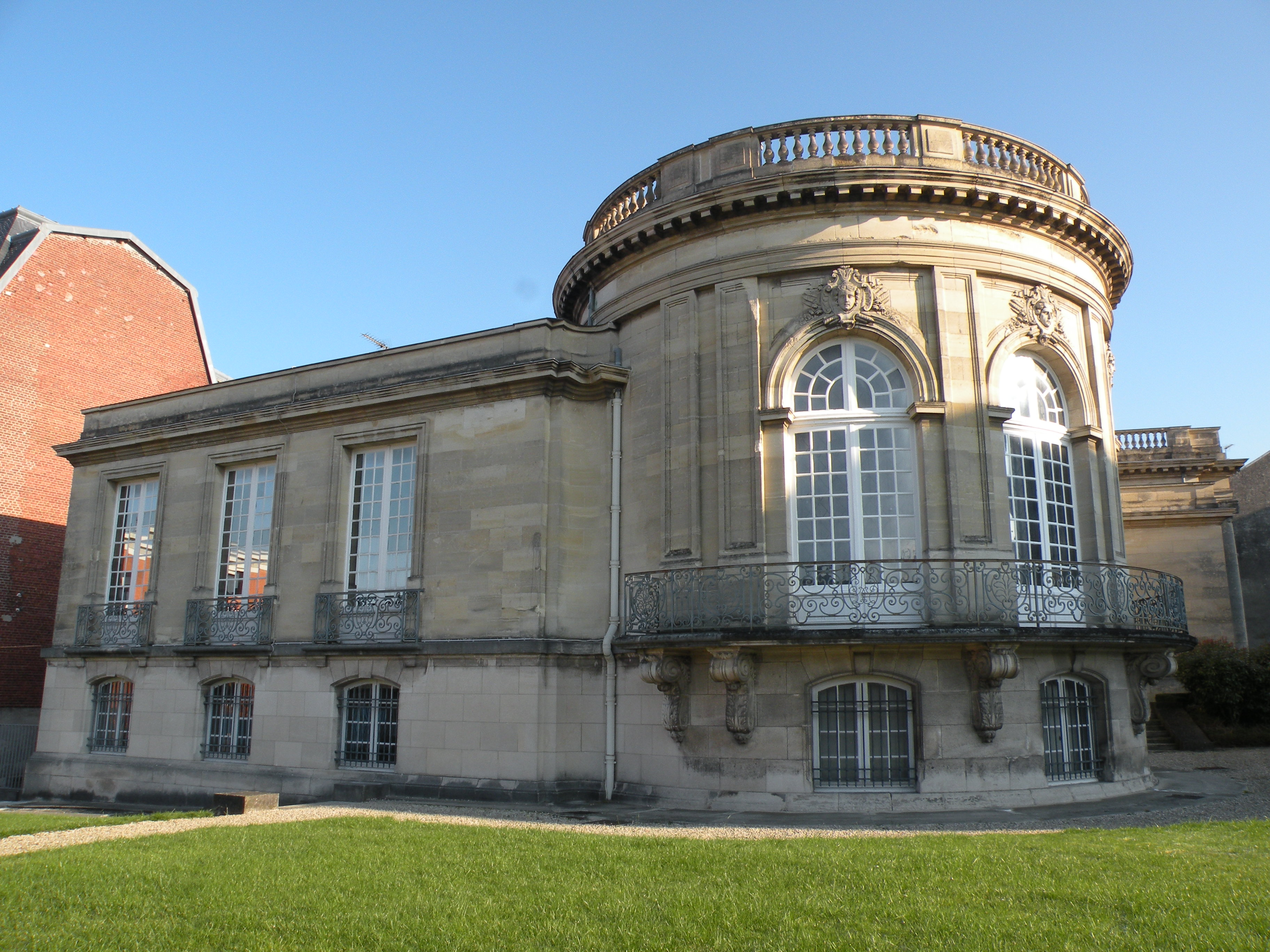 Musée Antoine-Lécuyer